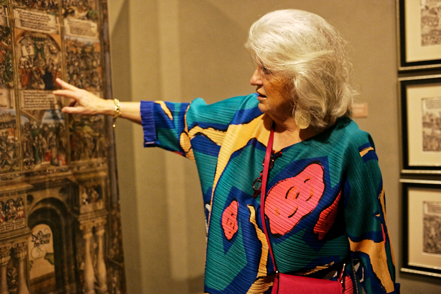 Wikipedianer mit der Kuratorin Monika Frenzel in der Innsbrucker Hofburg bei der Führung durch die Ausstellung 500 Jahre Maximilian I.